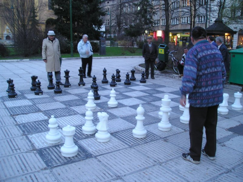 Street chess in Sarajevo